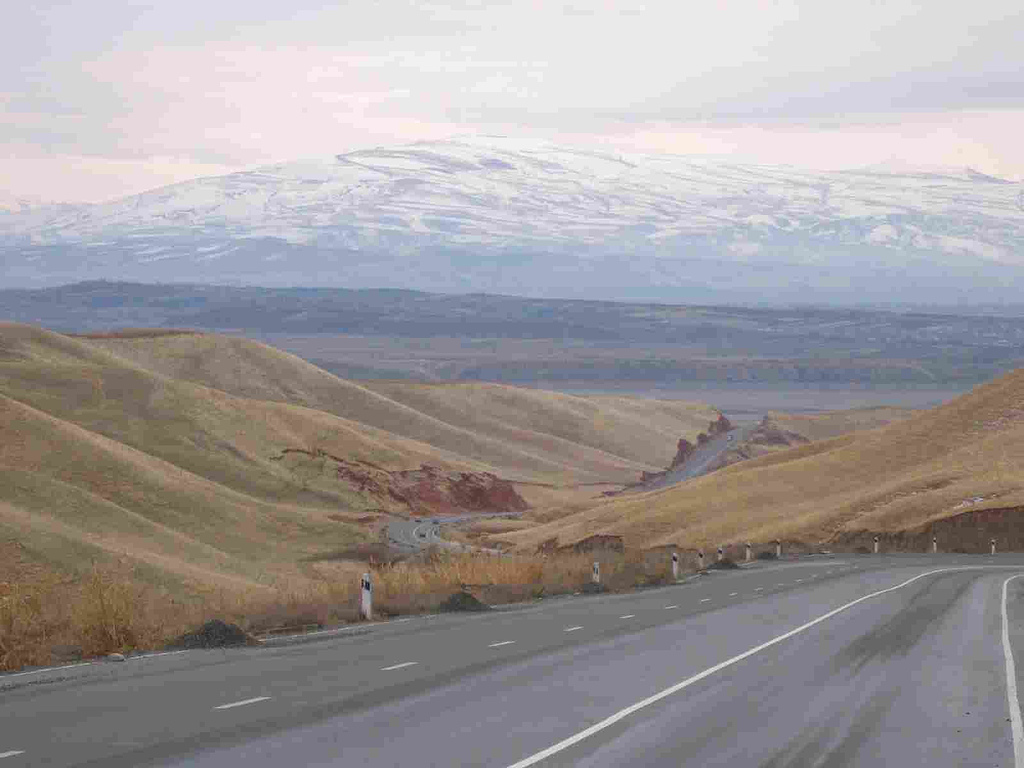 road Jalalabad-Osh 15